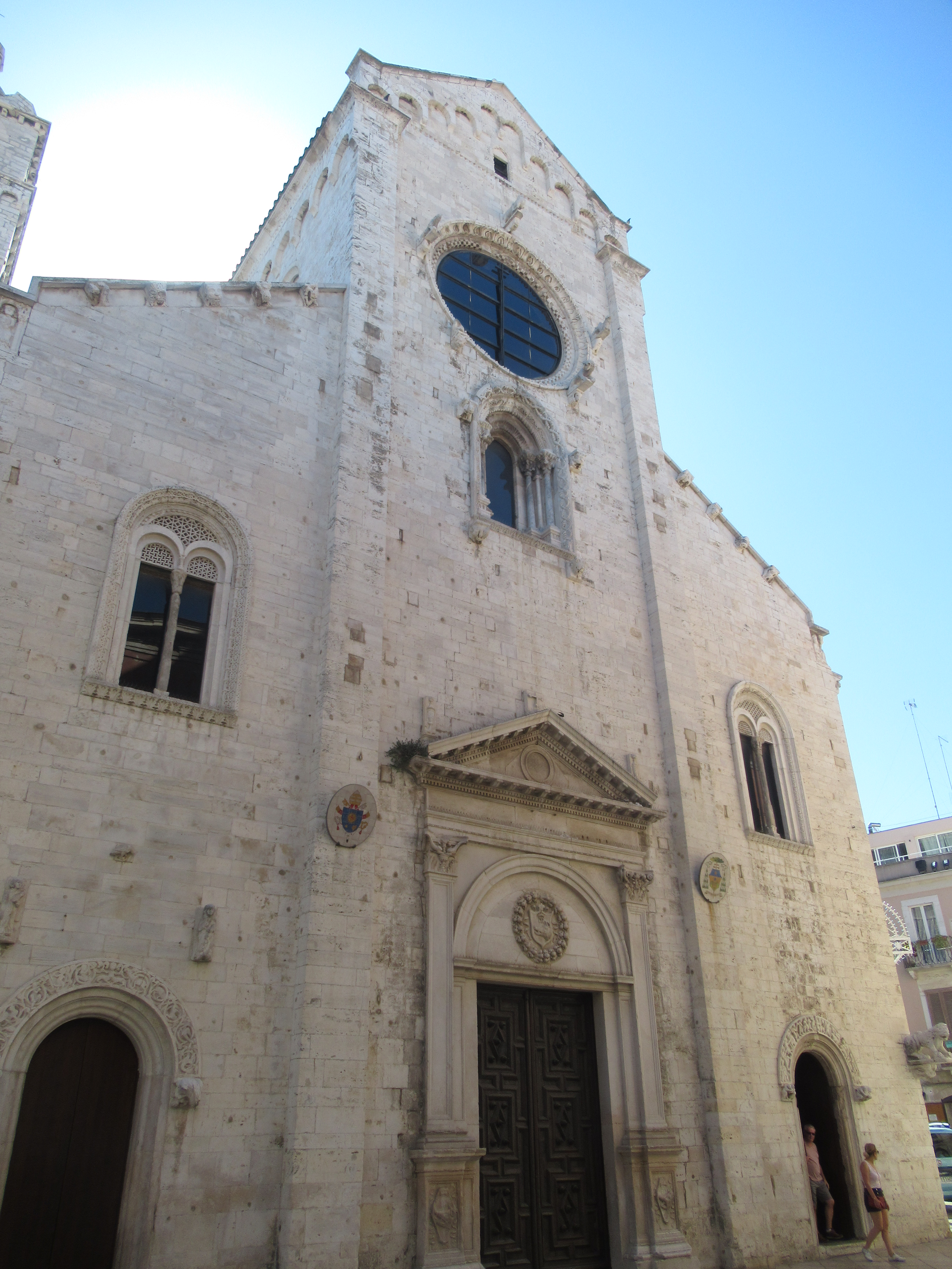 Facciata della concattedrale di Barletta